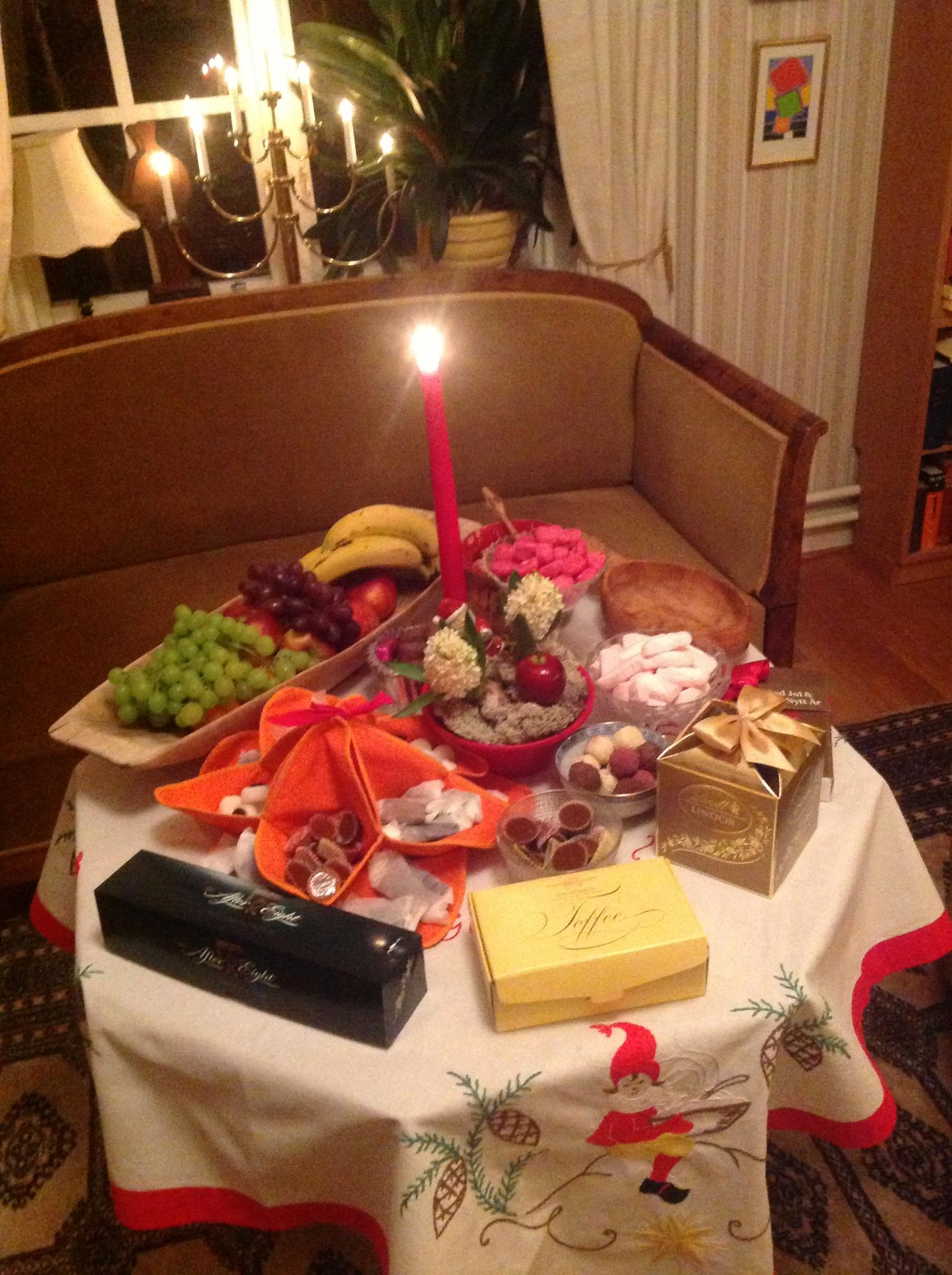 svenskt gottebord